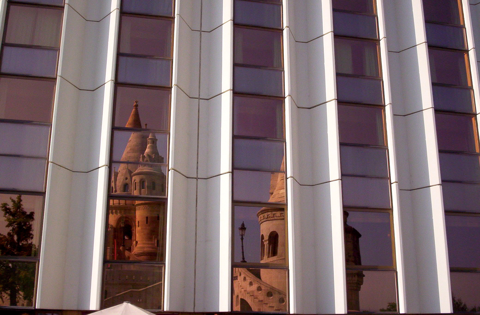 Halászbástya épülete díszlépcsővel (Budapest 1, Halászbástya) This is a photo of a monument in Hungary, Identifier: 103